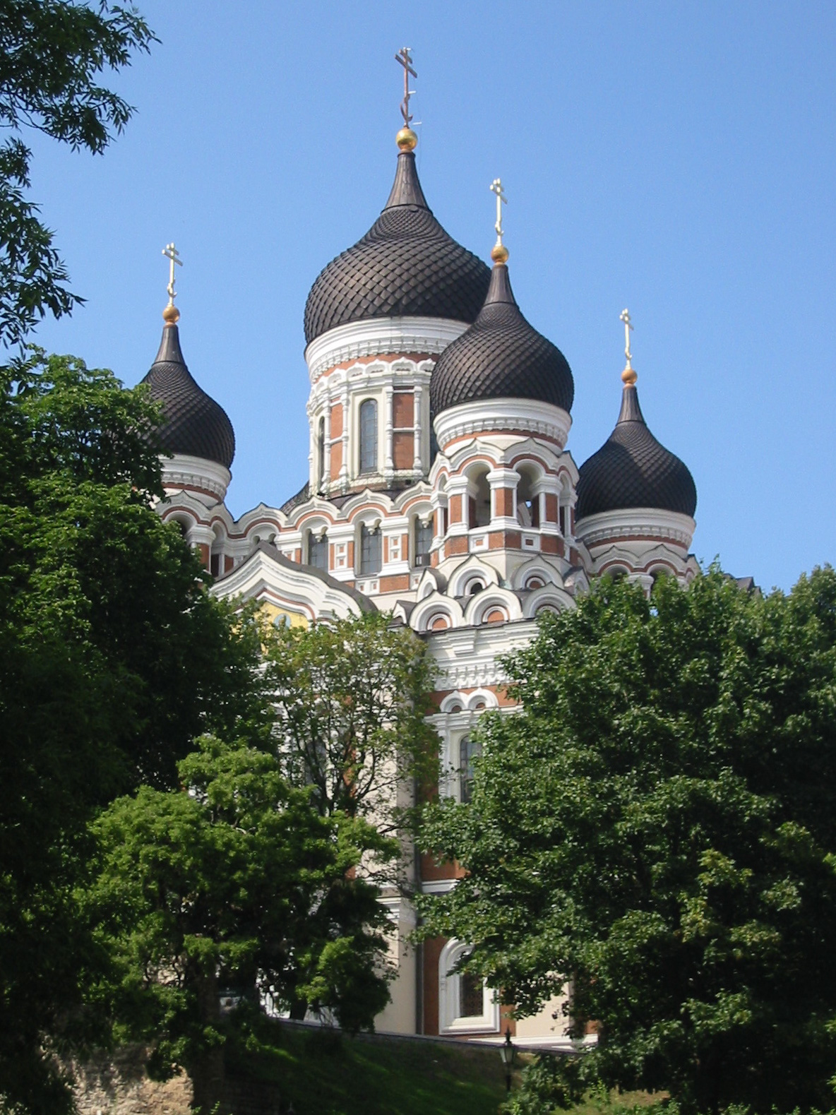 Alexander-Newski-Kathedrale, Tallinn